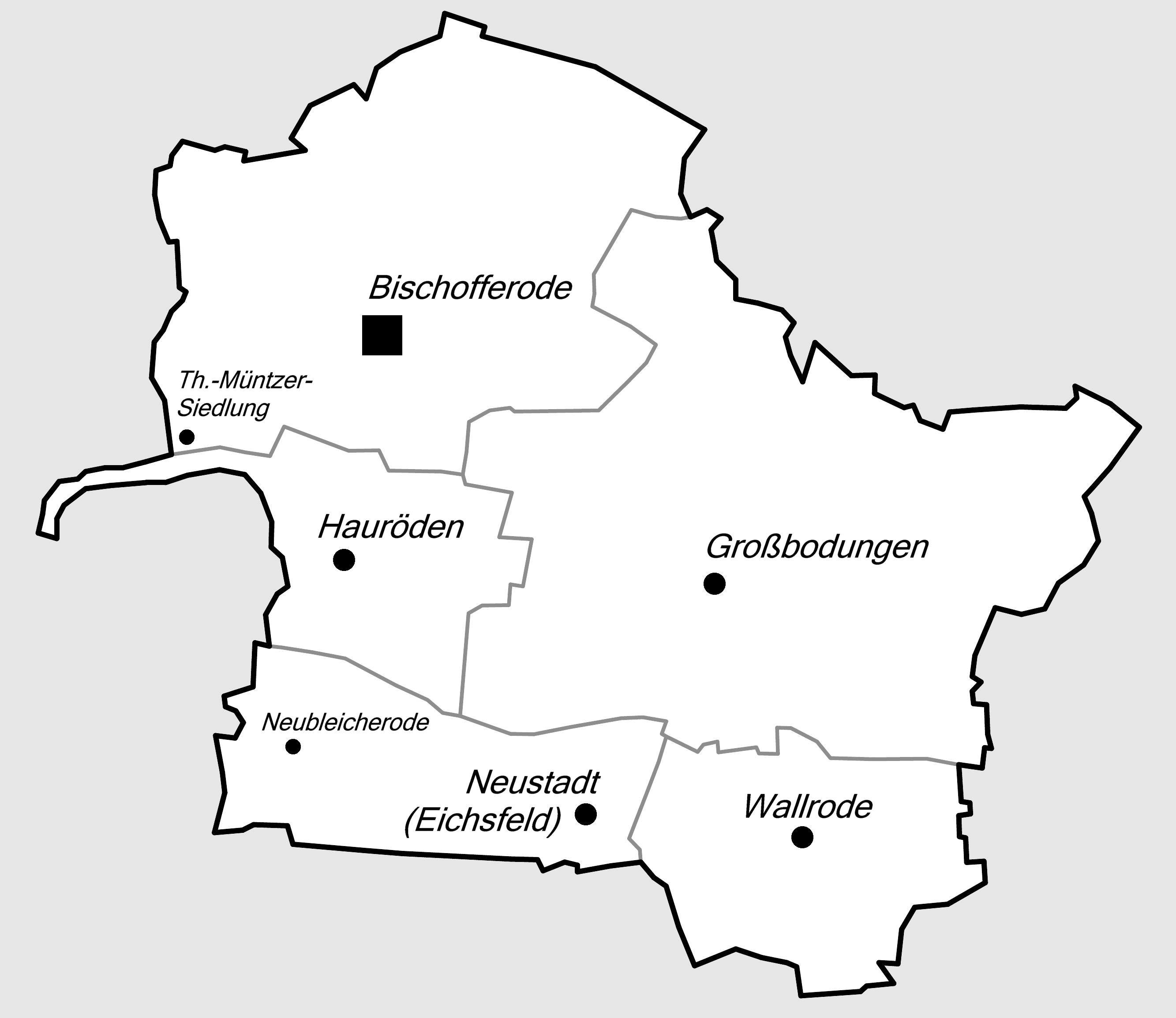 Am Ohmberg, Gemeindegliederung